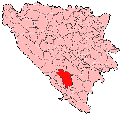 Prikaz općine Mostar u Bosni i Hercegovini